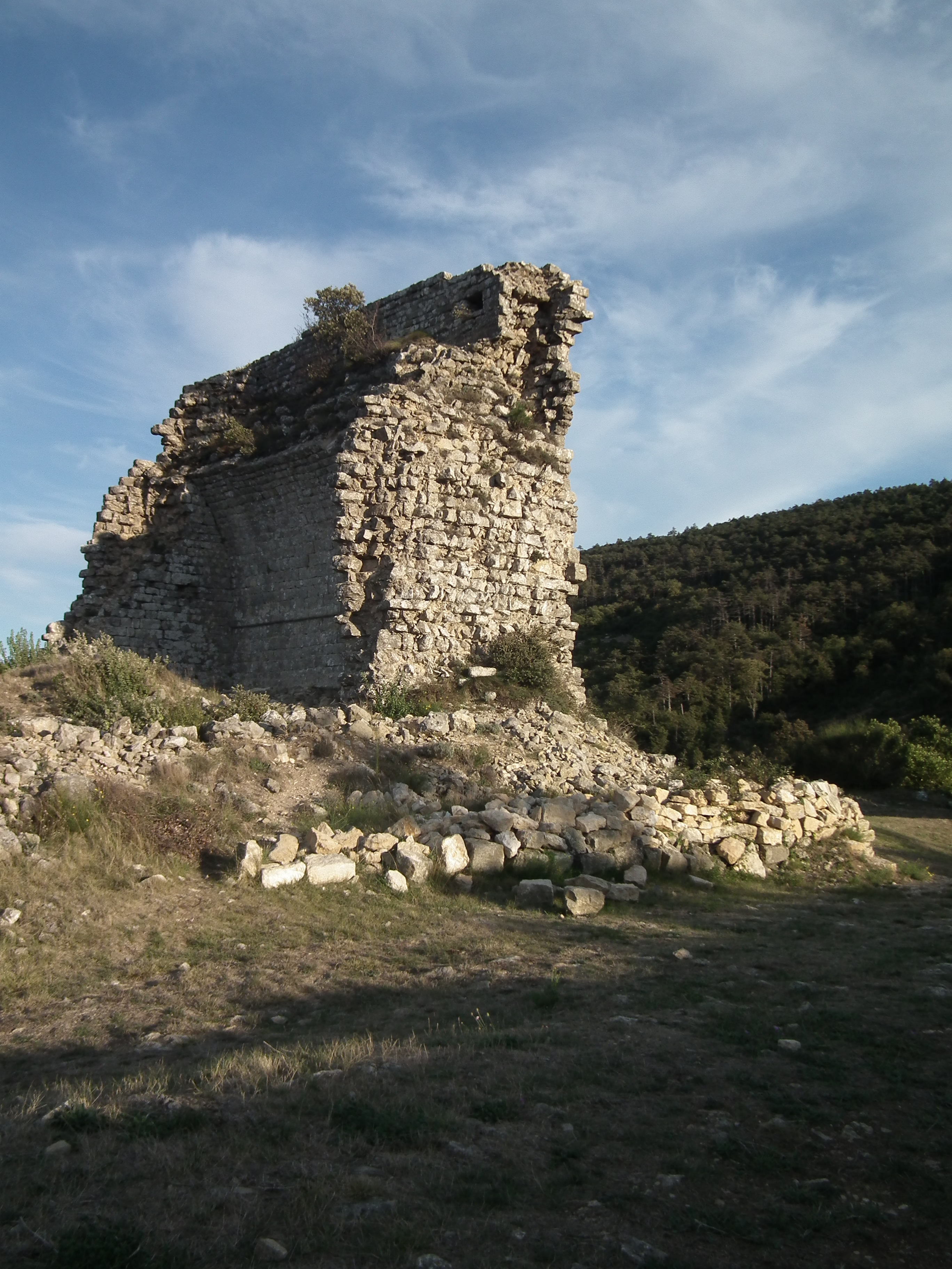 Localisation: 43°10'14"N 2°30'00"E .